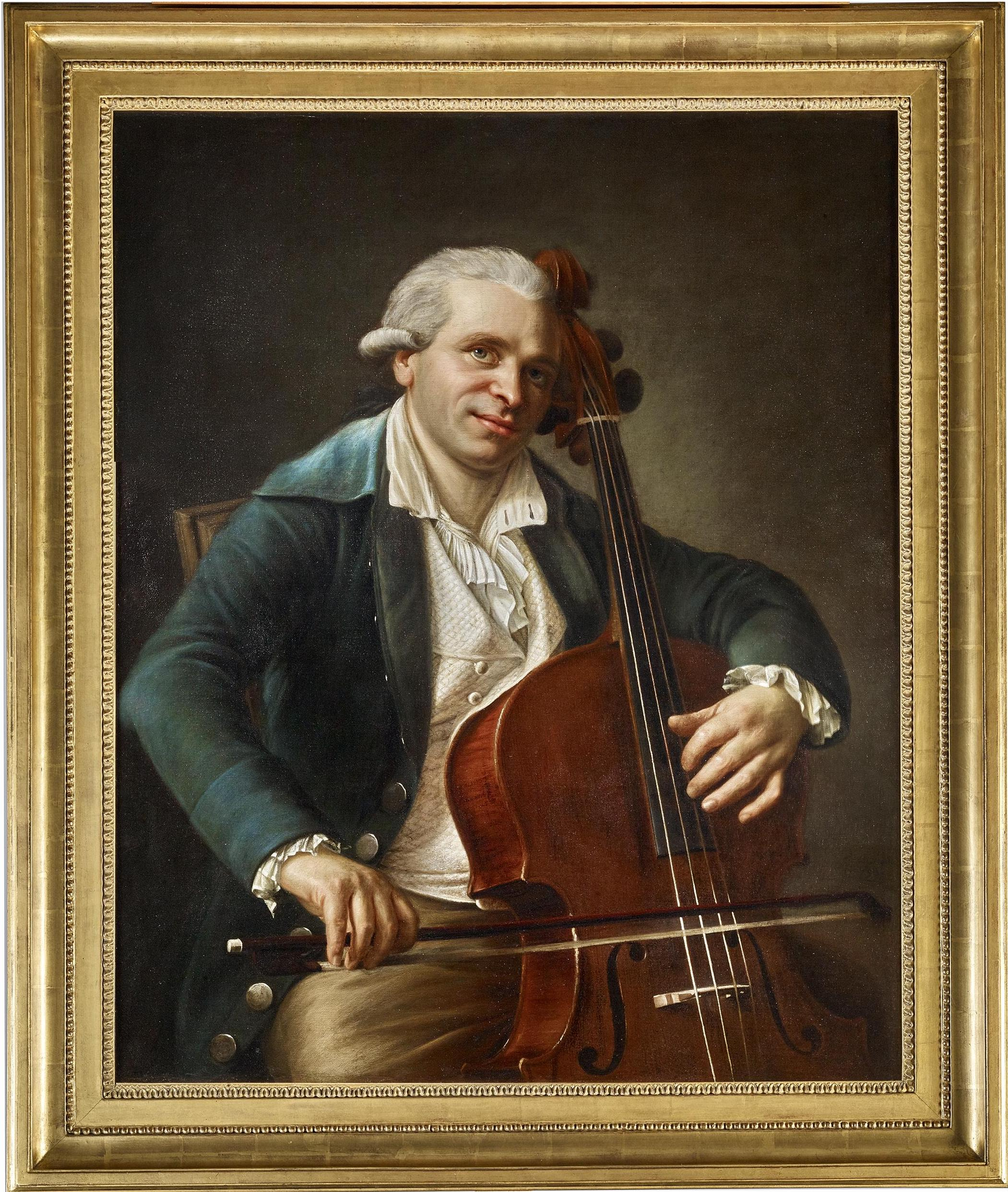 Jean-Louis Duport (1749-1819) violoncelliste par Remi-Fursy Descarsin (1747-1793)